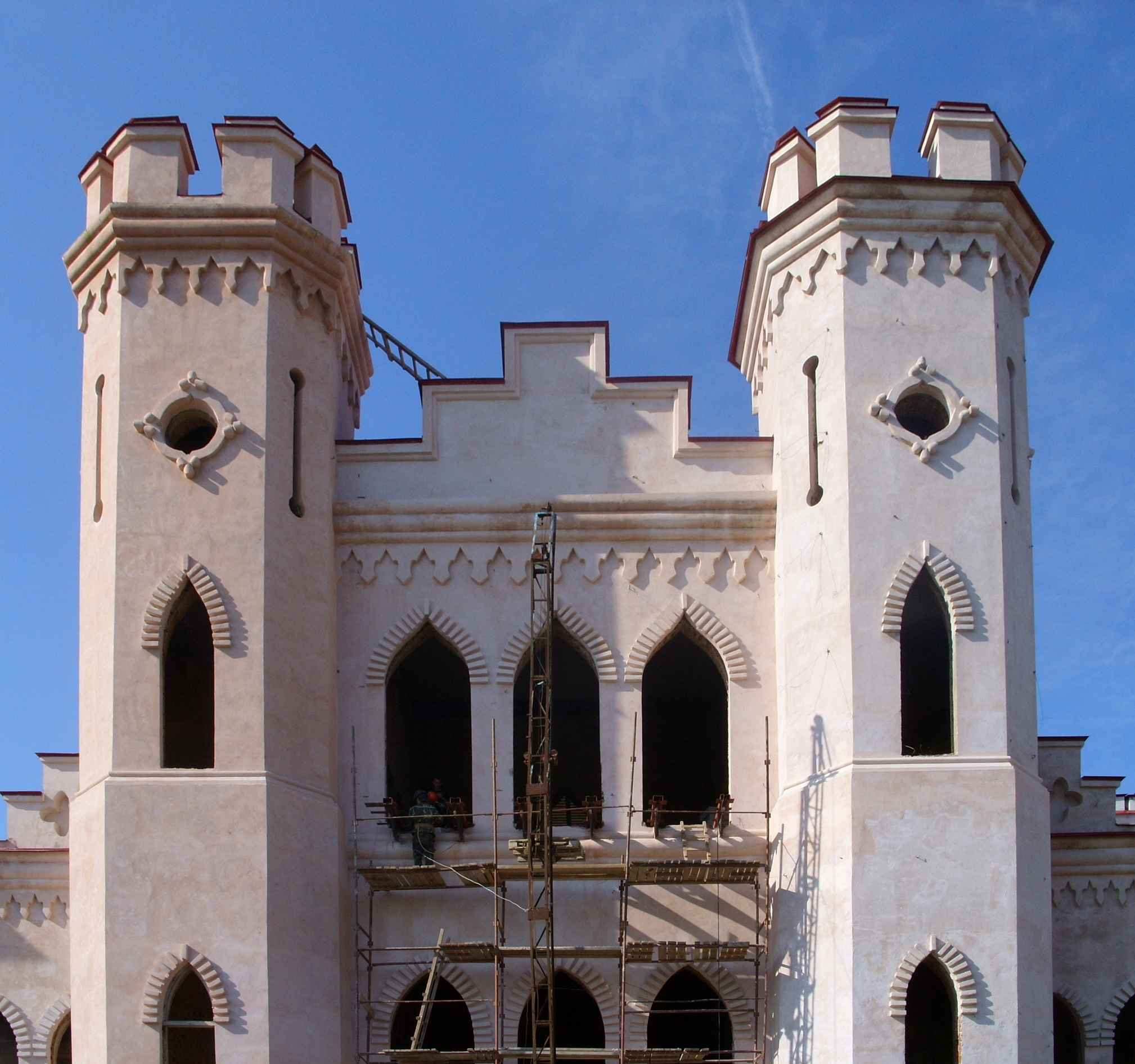 Беларуская (тарашкевіца): Косаўскі палацава-паркавы ансамбль: рэшткі былога палацу Пуслоўскіхмэмарыяльны музэй-сядзіба Т. Касьцюшкіфрагмэнты парку. г. Косава This is a photo of Belarusian heritage monument. Reference number: 111Г000305 ( WLM)